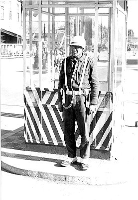 1972-73 yılları arasında Sinop Amerikan Radar Üssü'nde görev yapan radar personeli James Bedner'ın Samsun'u ziyareti sırasında çektiği bir fotoğraf. Cumhuriyet Meydanı civarında bekleyen bir asker.